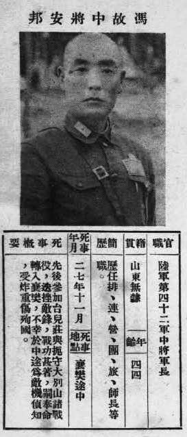 抗戰軍人忠烈錄第一輯中的烈士遺像